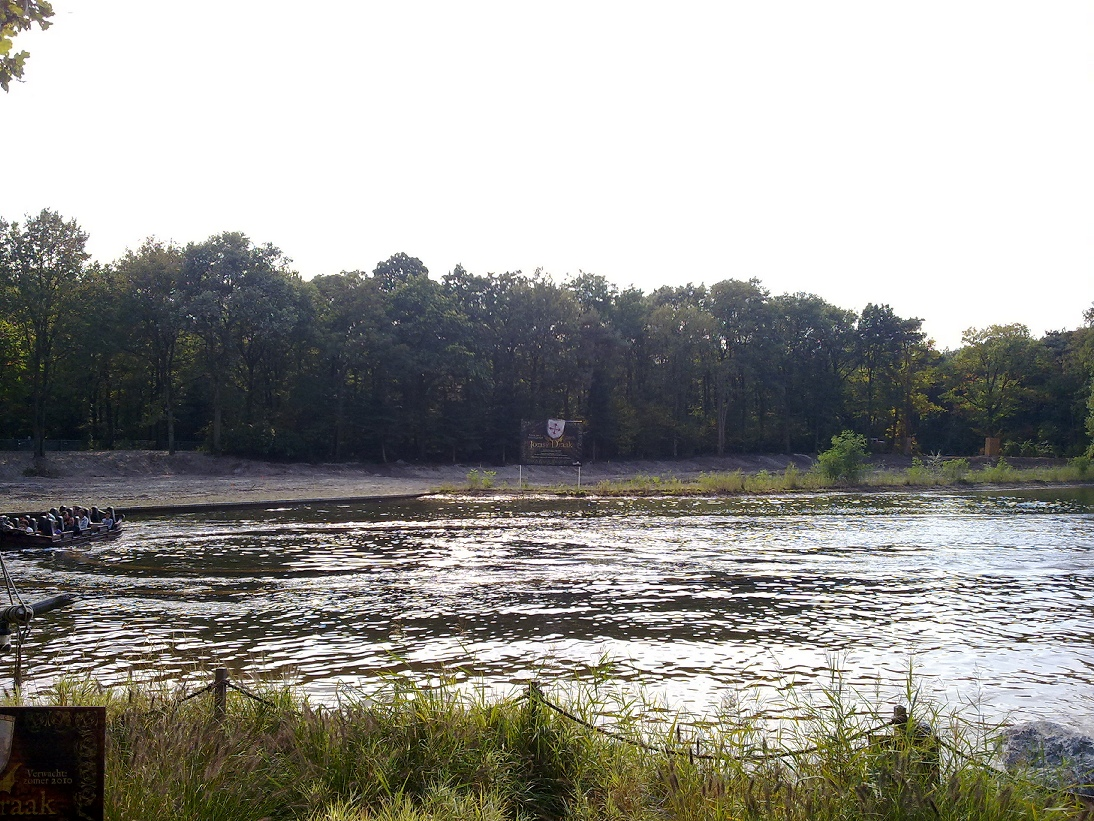 Waar de pegassus stond.